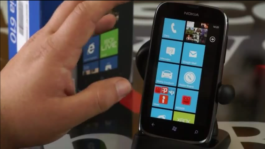 esta es la foto del nokia lumia 610